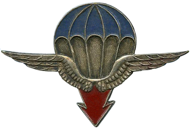 Insigne de la 25e Division Aéroportée (25e DAP - 1946-48)